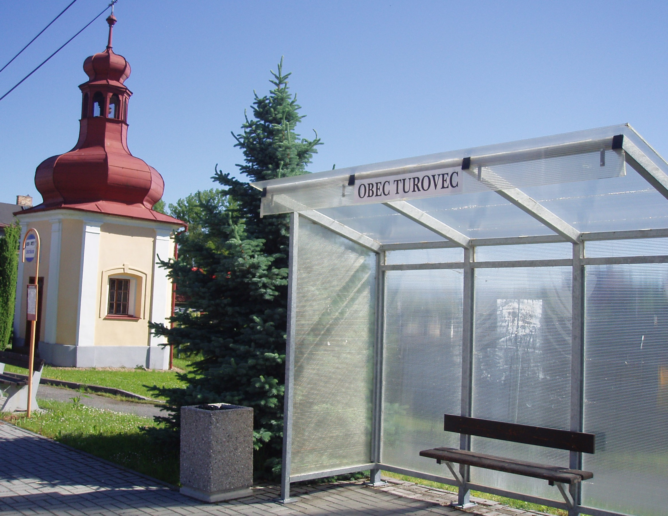 Zastávka s kapličkou na návsi